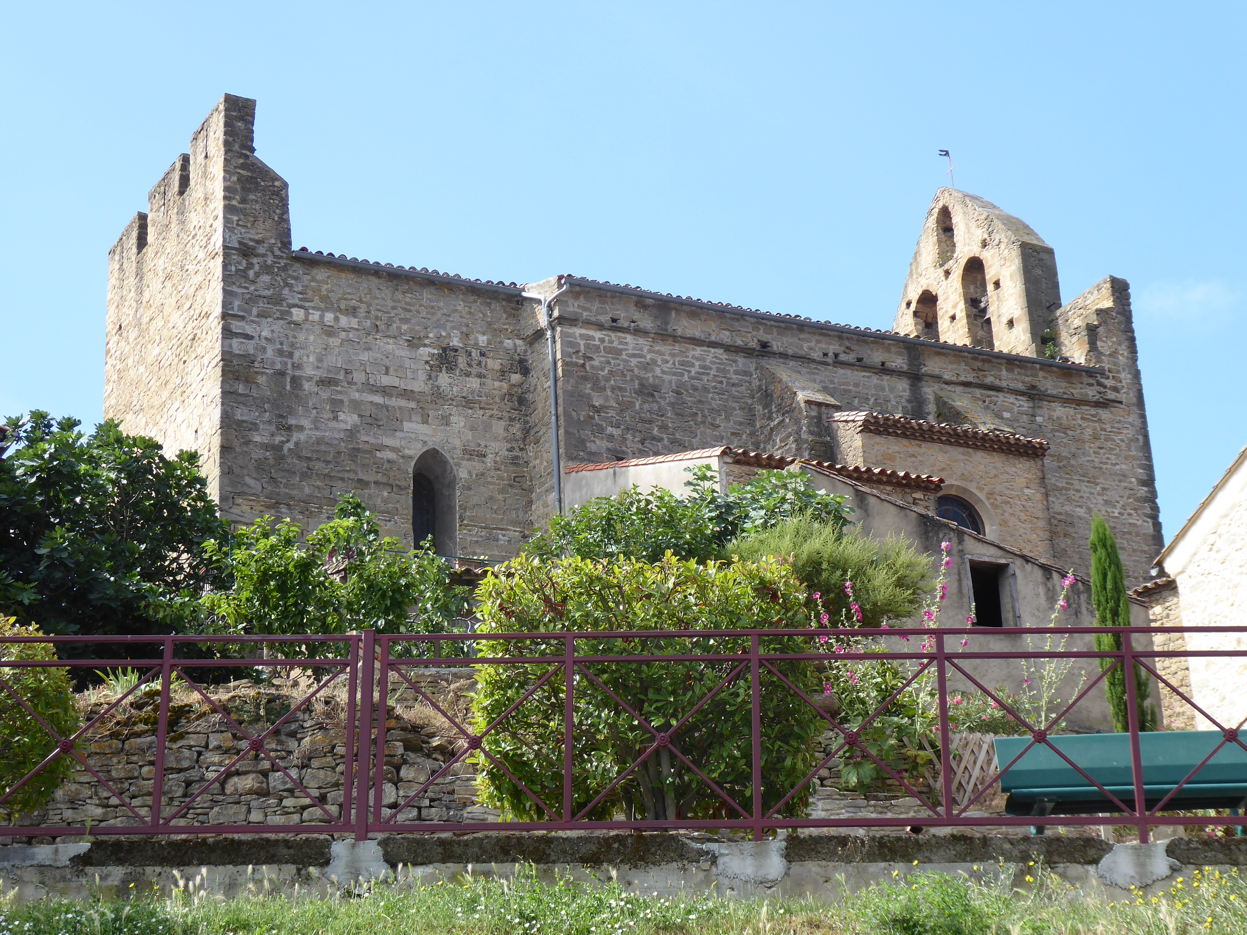 Église Saint-Julien-et-Sainte-Basilisse de Magrie (01)